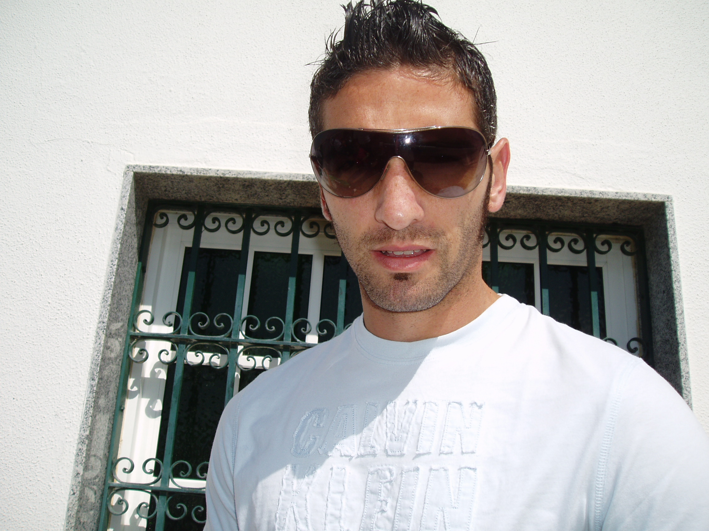 El jugador Arturo García Muñoz, "ARZU", a la salida de los entrenamientos